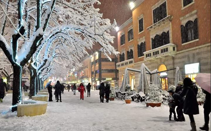 Piazza XI Settembre dopo la nevicata di gennaio 2016 nel centro di Cosenza